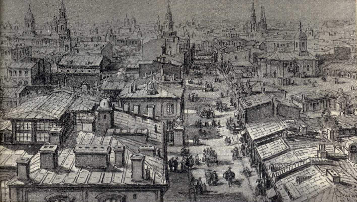 Bucharest in 1868 from Turnul Colţei